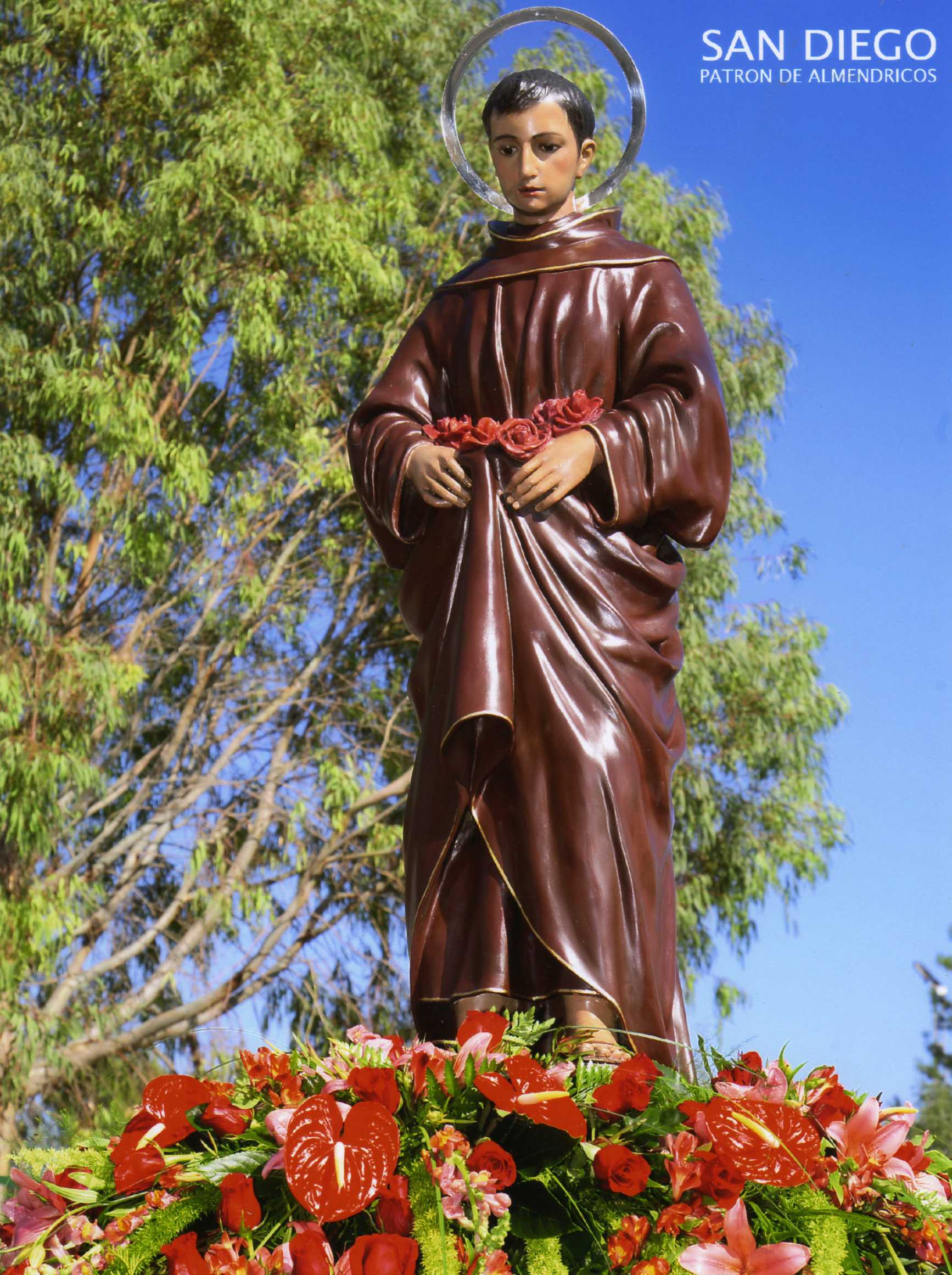 La imagen de San Diego de Alcala que poseemos en Almendricos